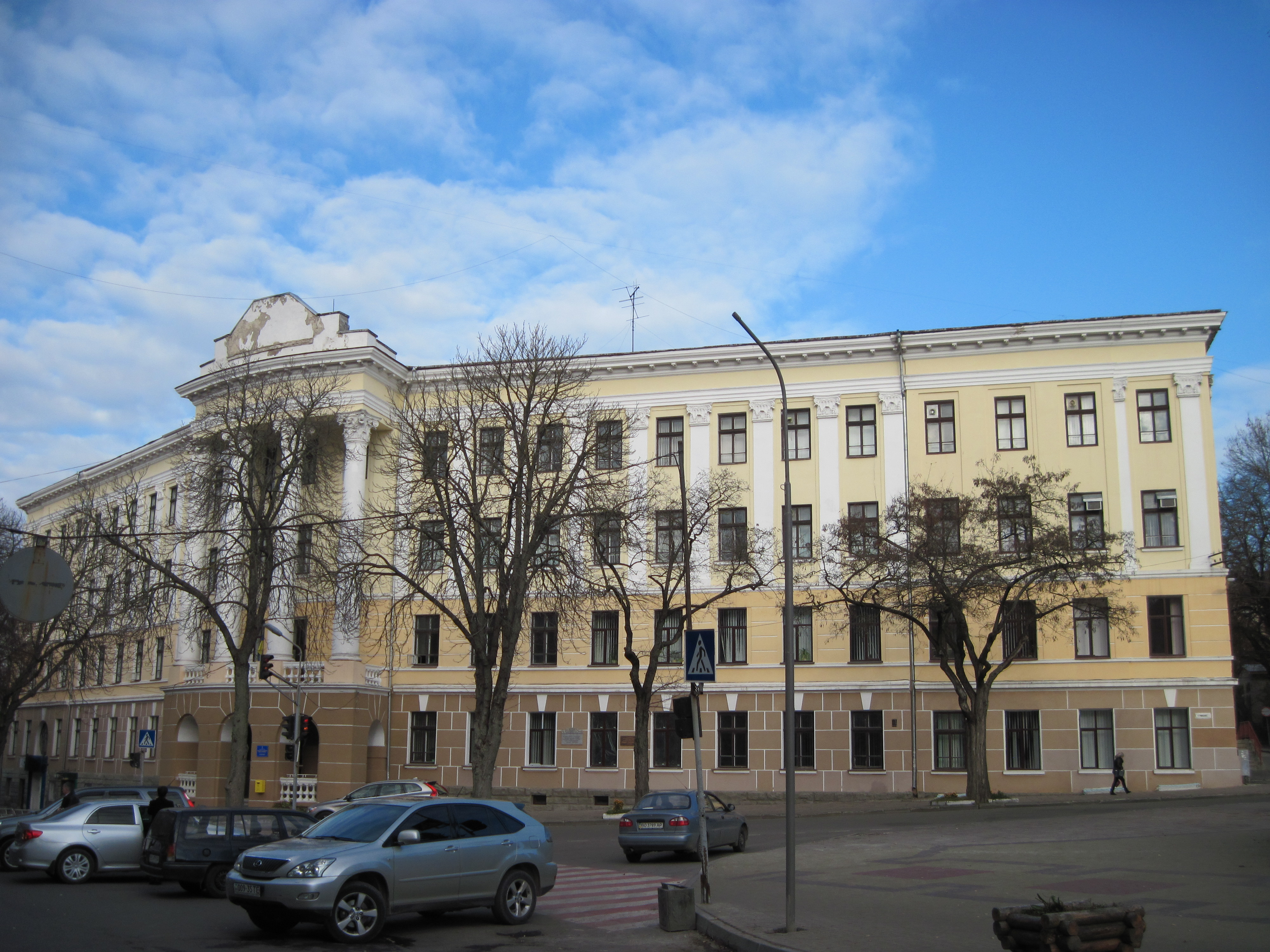 Гімназія Ю. Словацького на вул. Грушевського, 1 у Тернополі, в якій знаходився уряд Західно-Української Народної Республіки, працював голова уряду ЗУНР Сидір Голубович.